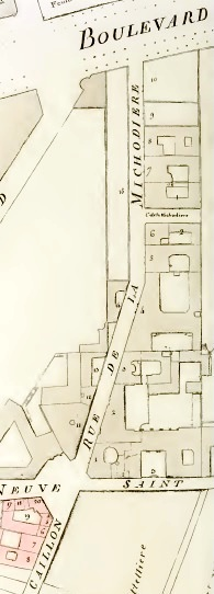 La rue de la Michodière vers 1780, c'est-à-dire juste après son ouverture. Extrait de l'atlas de la censive de l'Archevêché de Paris publié en 1786.